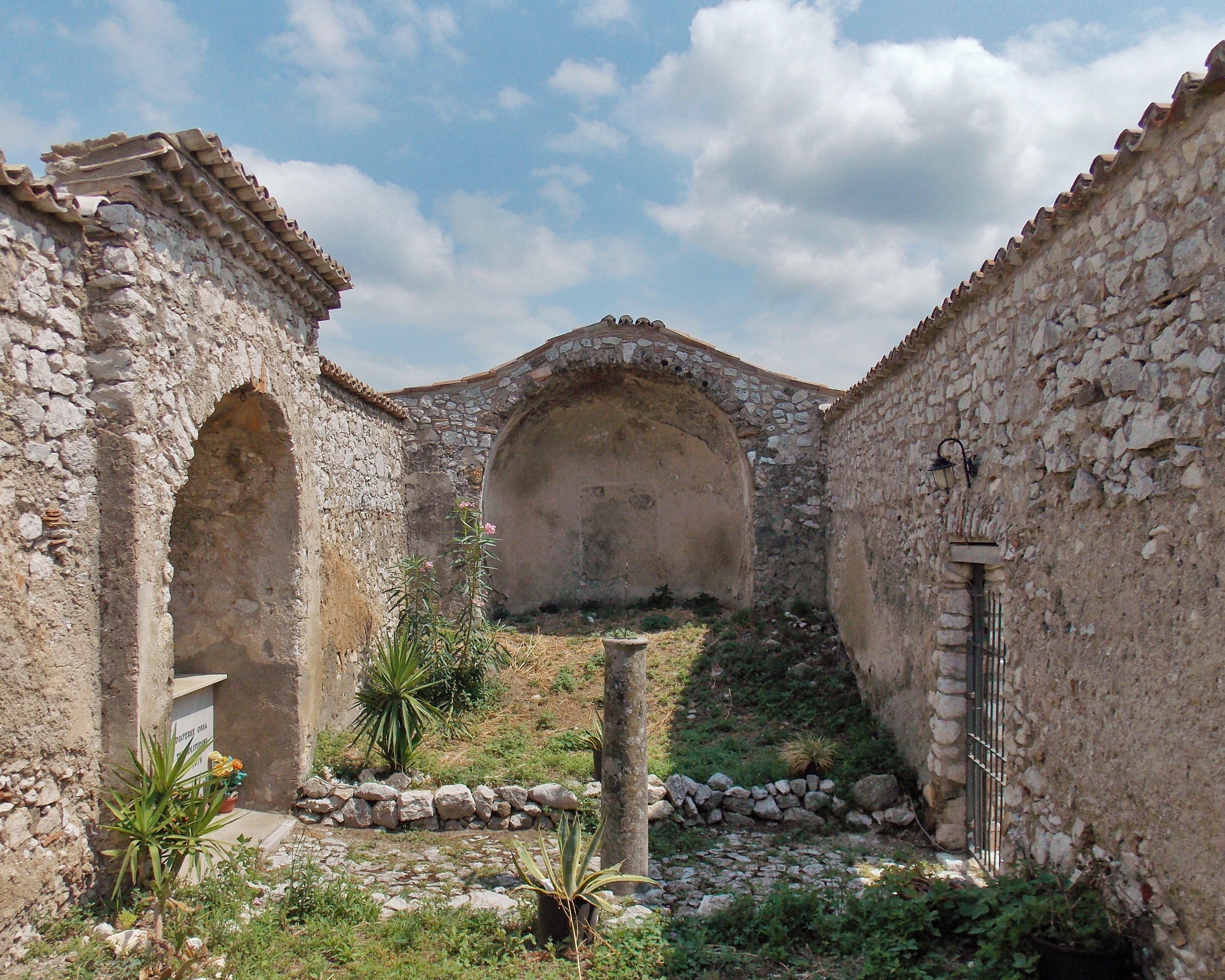 Il vecchio cimitero di Latovetere di Montesarchio (BN), in origine chiesa altomedievale